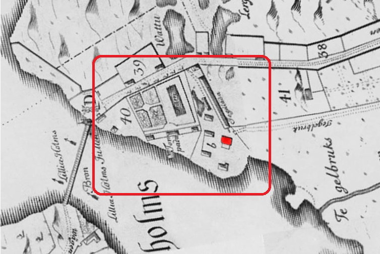 Del av Stockholmskartan visande Jakobsbergs malmgård vid Hornstull